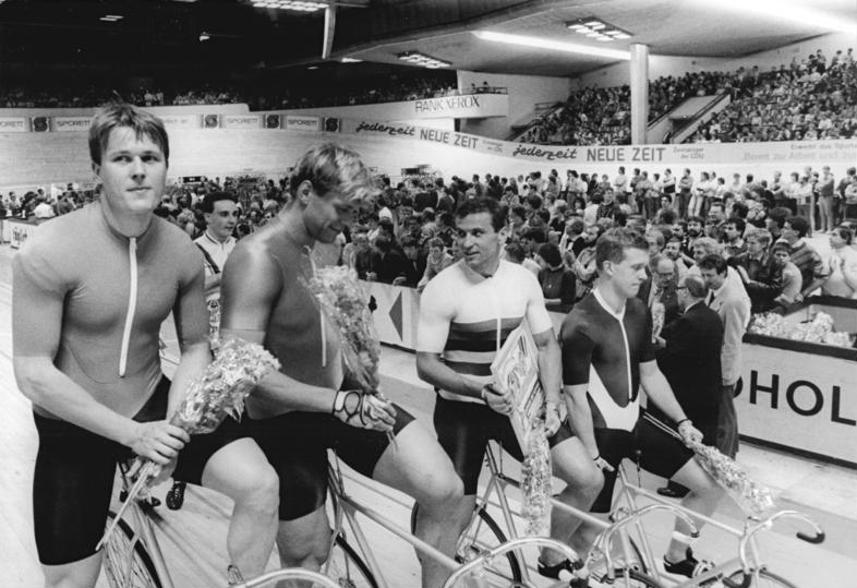 L. Heßlich, M. Hübner, B. Huck, R.-G. Kuschy ADN-ZB Settnik 4.12.87-zin - Berlin: Winterbahn - Mit Beifall feierten die Zuschauer in der vollbesetzten Werner-Seelenbinder-Halle zum Auftakt der 36. Winterbahn-Saison die besten DDR-Radsportler des Jahres 1987. 22 Fahrer, darunter alle Medaillengewinner der Junioren- und Senioren-Weltmeisterschaften, sowie die erfolgreichen Friedensfahrer drehten in ihren vielfarbigen Siegertrikots die erste Runde. Einen Super-Einlauf hatten die Bahnsprinter um Weltmeister Lutz Heßlich (2.v.r.) bei der WM in Wien hingelegt. Michael Hübner (2.v.l.), Bill Huck (r.) und Ralf-Guido Kuschy (l.) belegten in dieser Reihenfolge die Plätze zwei bis vier.